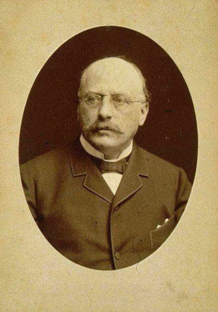 Jacques Kablé. Meyer, Antoine ((photogr)). Bibliothèque nationale et universitaire de Strasbourg